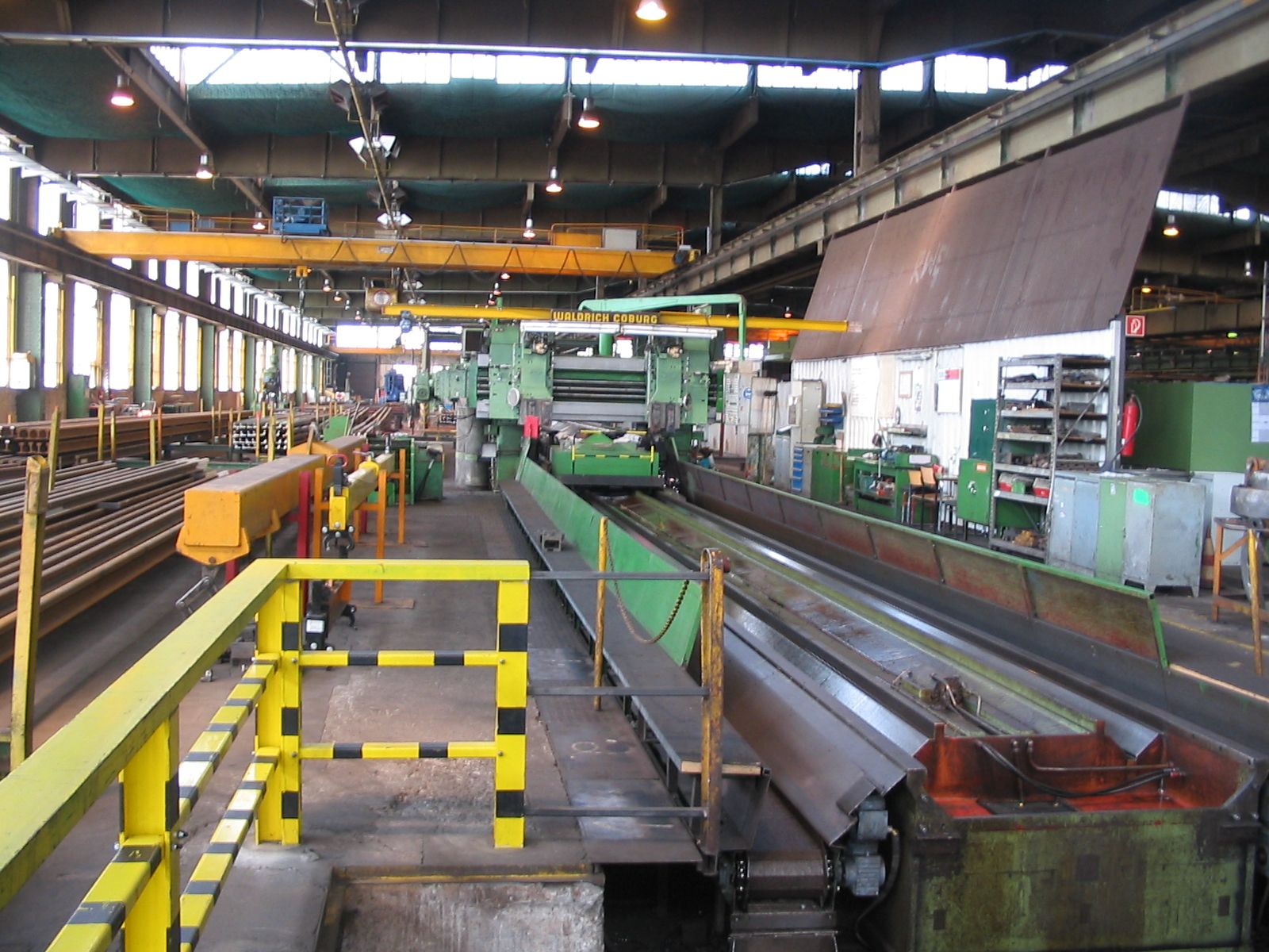 Weichenwerk Witten/DB Werk Oberbaustoffe Witten: Weichenrichthalle